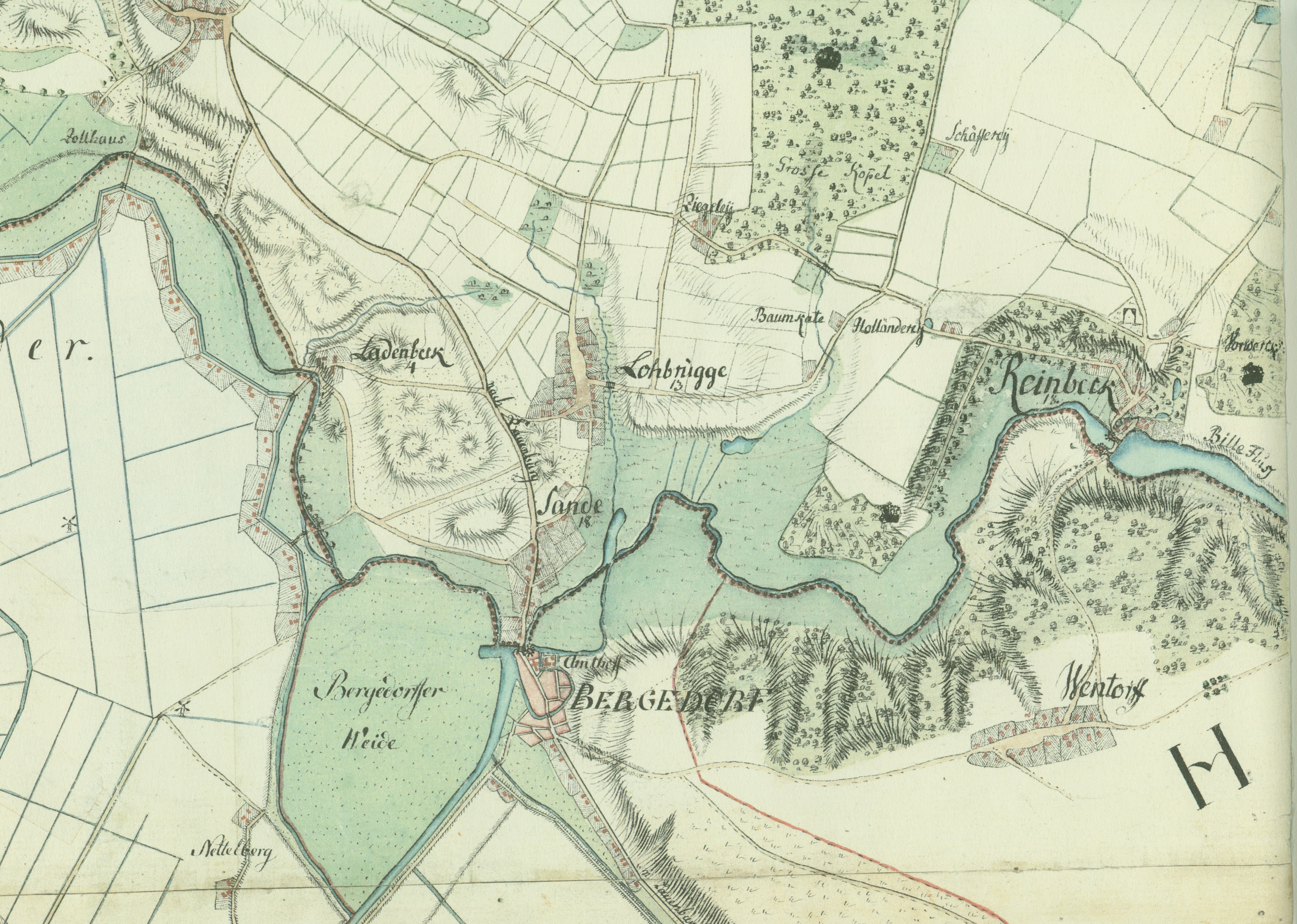 Varendorfsche Karte 63 (Ausschnitt Bergedorf) Topographisch-militärische Charte des Herzogtums Holstein. Aufgenommen in den Jahren von 1789 bis 1796 unter Leitung des Majors Gustav Adolf von Varendorf durch Offiziere des Schleswigschen Infanterieregimentes.